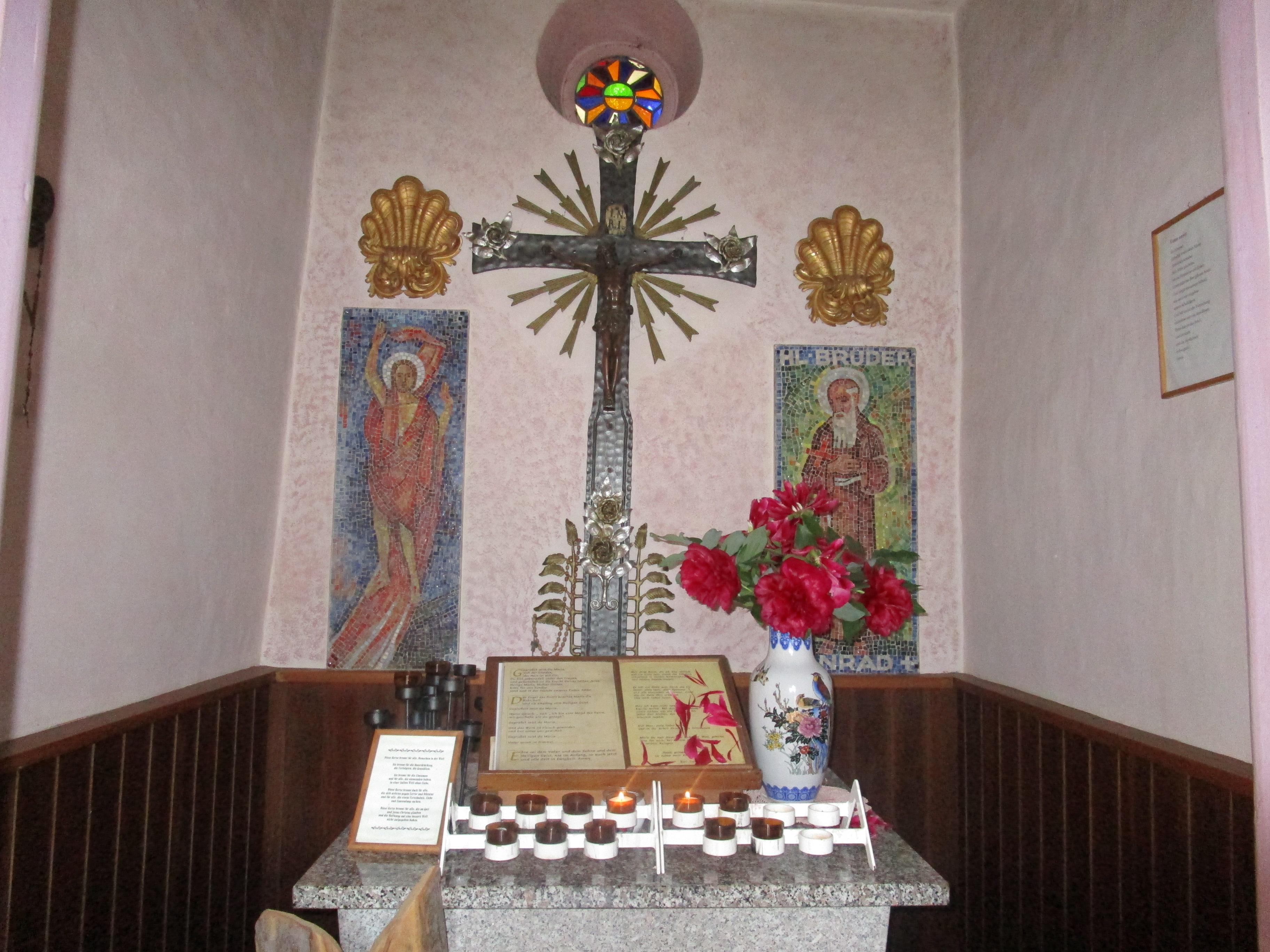 Die Quirinskapelle Gosheim wurde im Jahr 1858 oberhalb von Gosheim in der Schwäbischen Alb in einer Höhe von 987 Metern an der heutigen Kreisstraße 5905 von Gosheim nach Böttingen errichtet. An der Kapelle führt der Schwäbische-Alb-Nordrand-Weg vorbei.